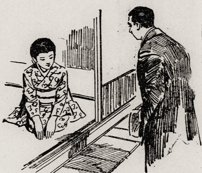 玄関での挨拶